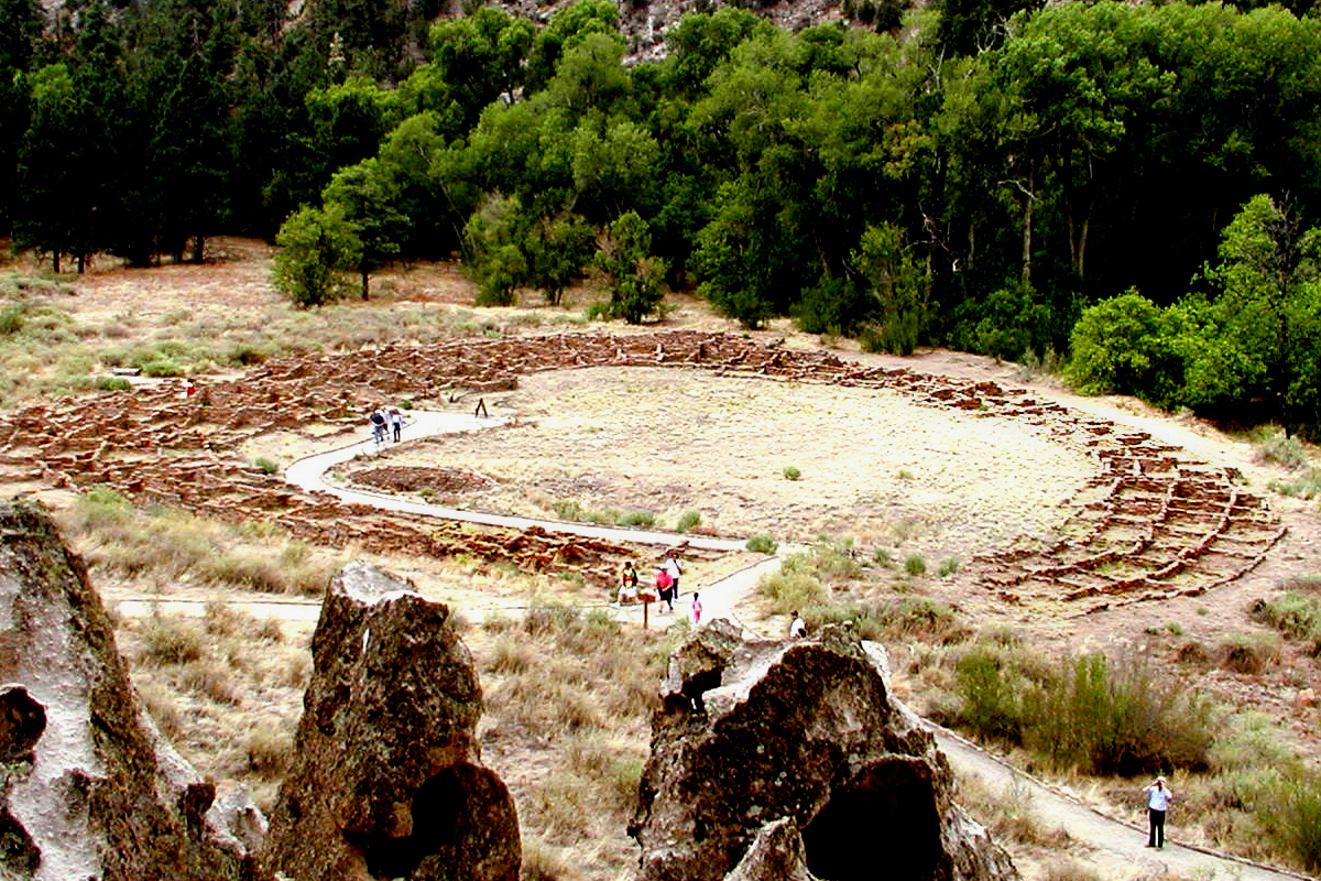 Bandelier National Monument (Ruin)